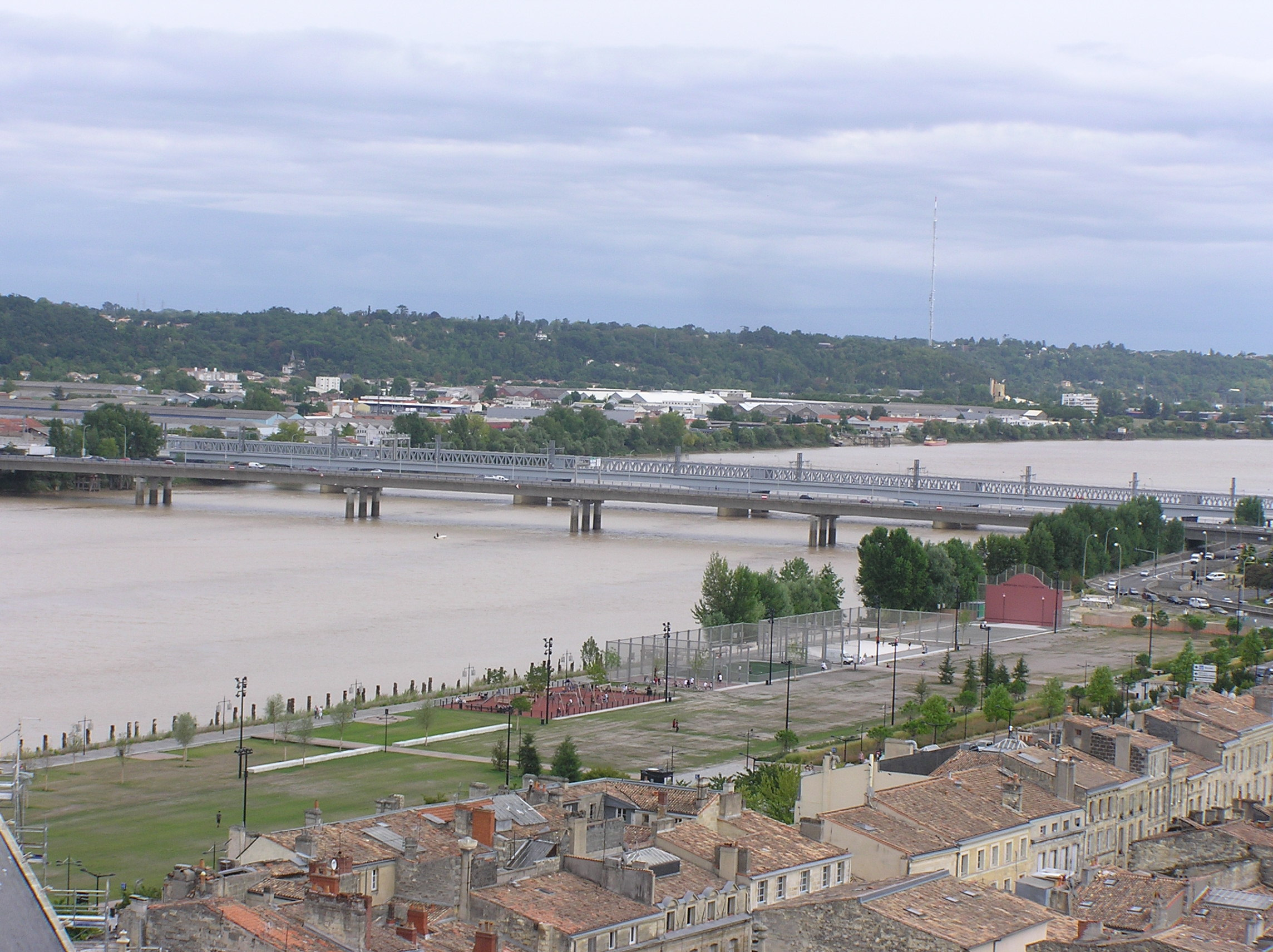 Bordeaux : Pont Saint-Jean, viaduc ferroviaire sous l'appellation locale Passerelle Eiffel vus de la flèche Saint-Michel